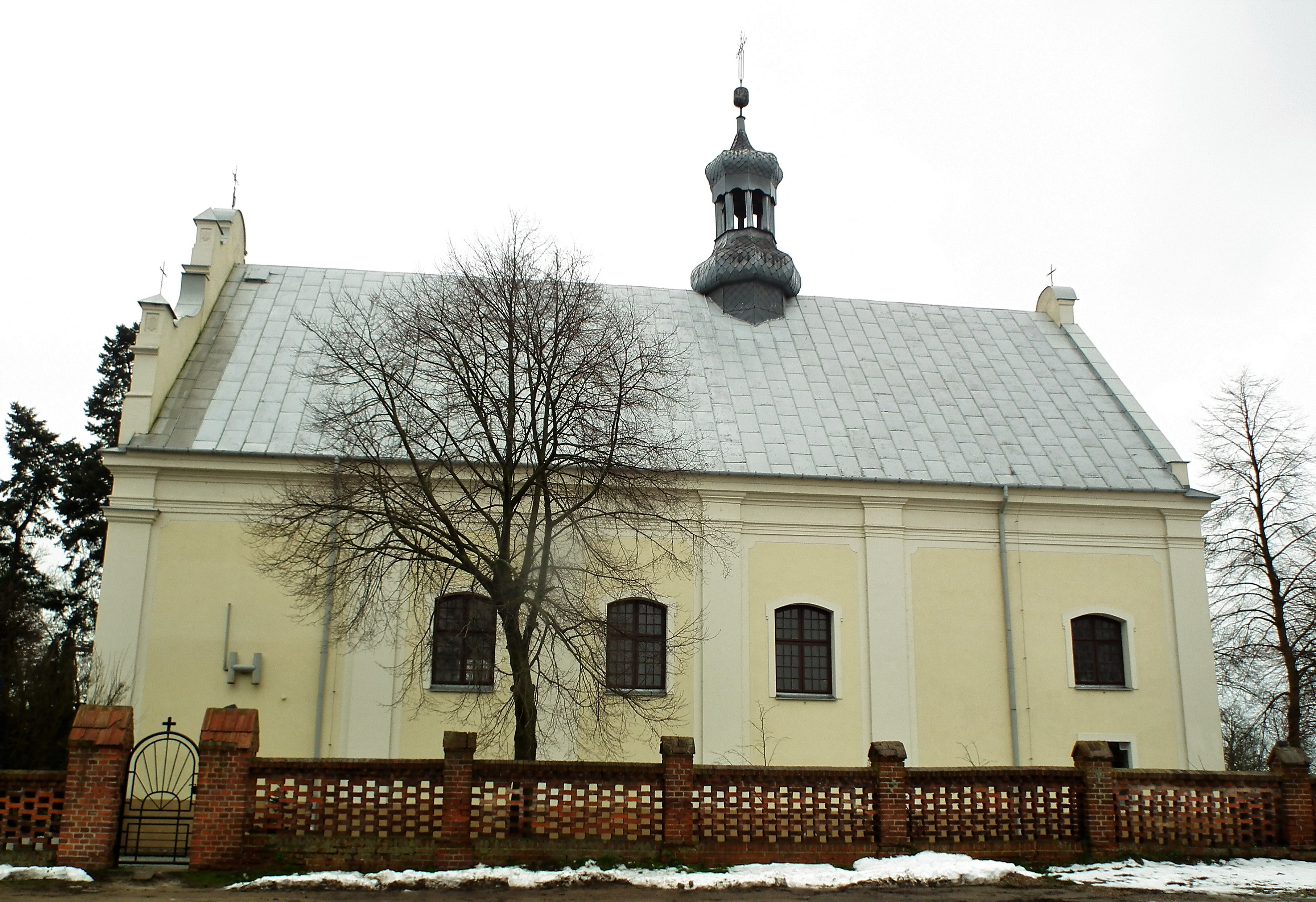 Kościół św. Wincentego a Paulo w Bądkowie Kościelnym.